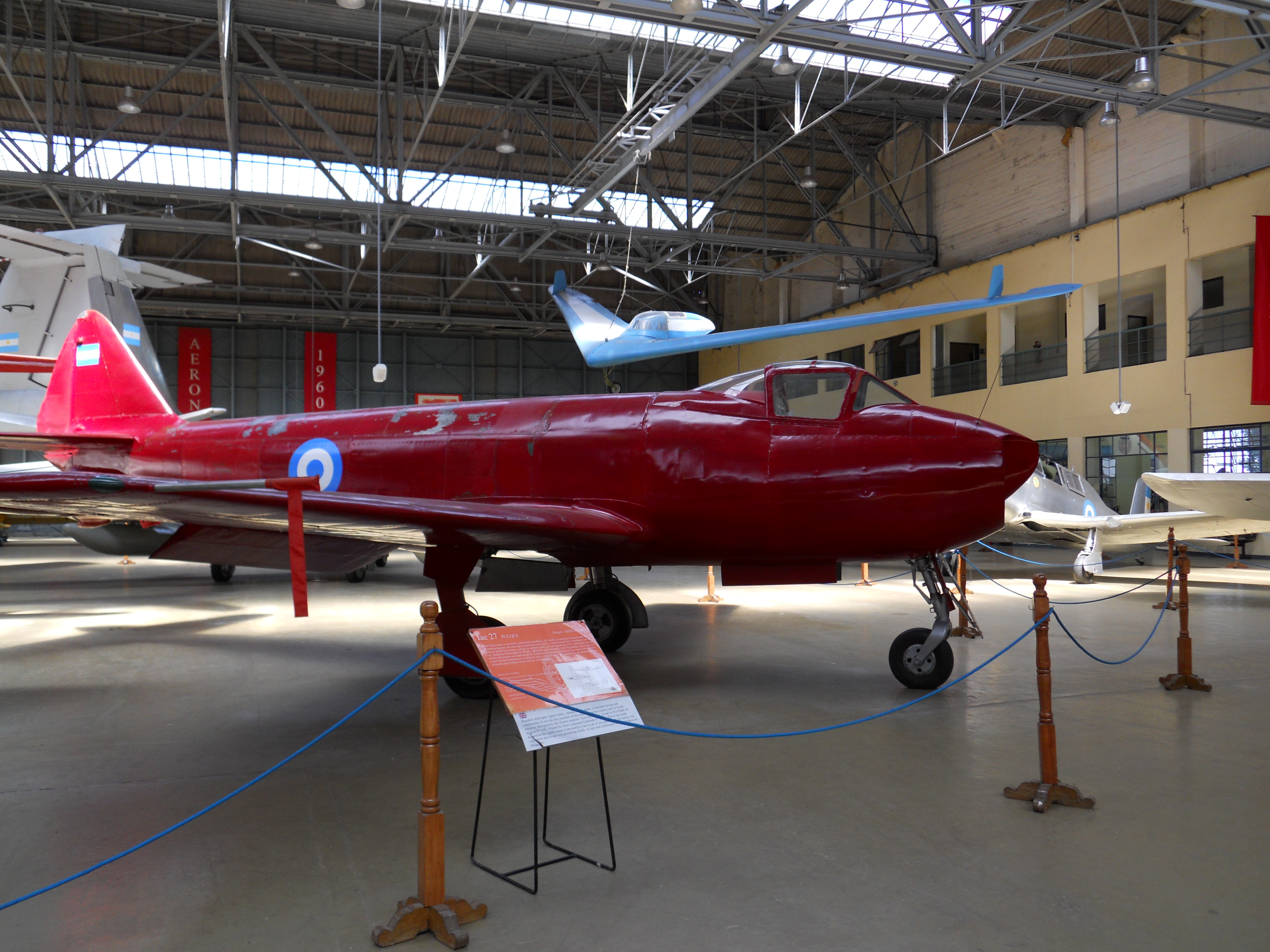 Pulqui I en el MNA, Moron, Buenos Aires, Argentina.